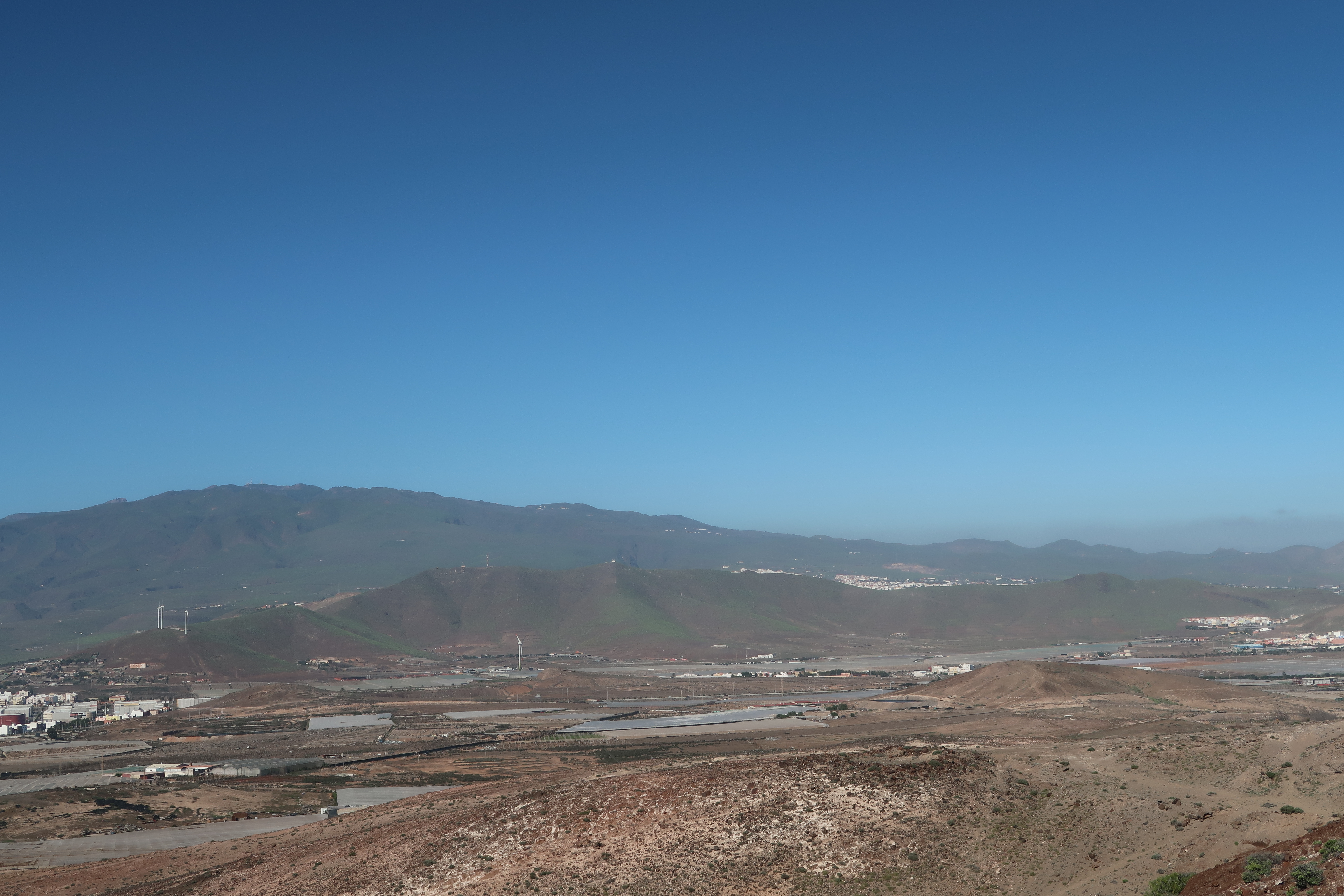 Conjunto conocido como Montaña de Agüimes